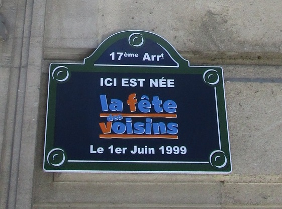 7 rue Vernier à Paris. Plaque en l'honneur de la Fête des Voisins